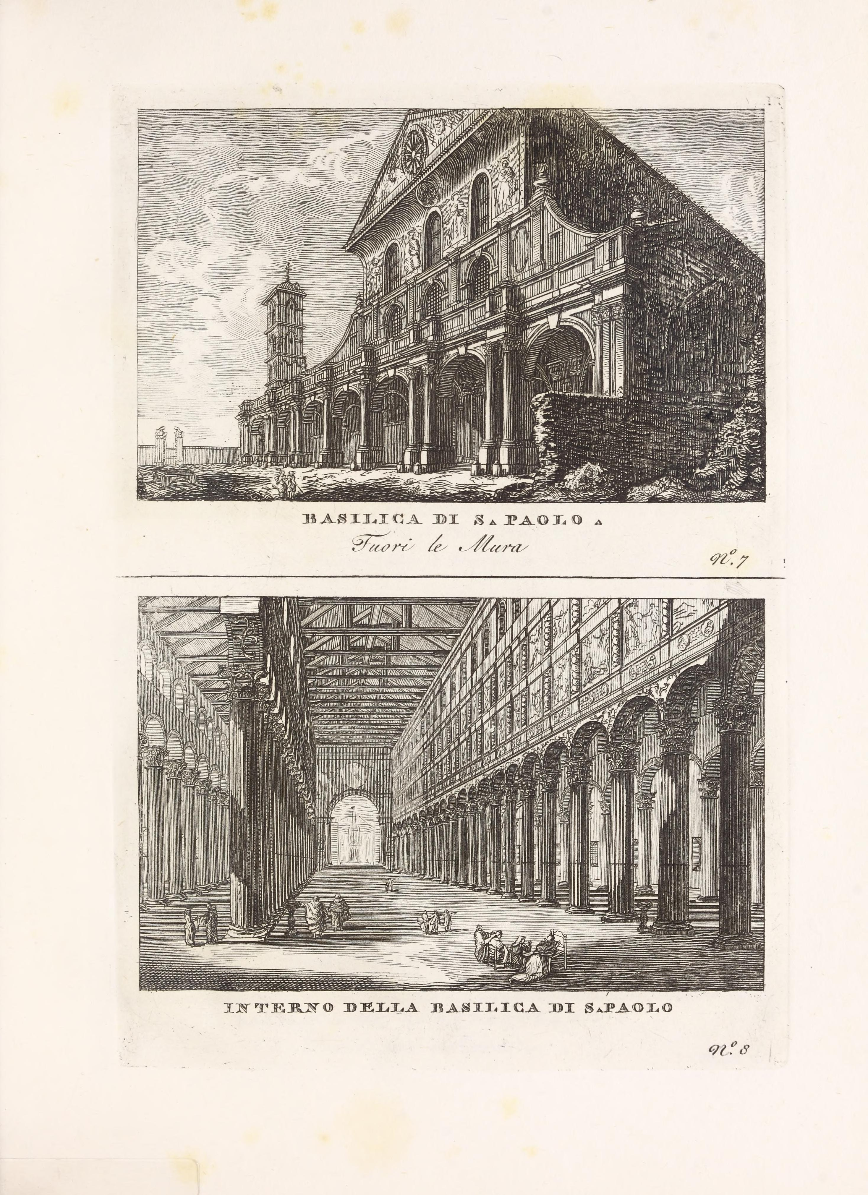 Illustrasjon hentet fra boken "Vedute antiche e moderne le piú interessanti della cittá di Roma" av ukjent forfatter og utgitt av Presso Venanzio Monaldini, Stefano Piale in Piazza di Spagna (it, [ca. 1820])